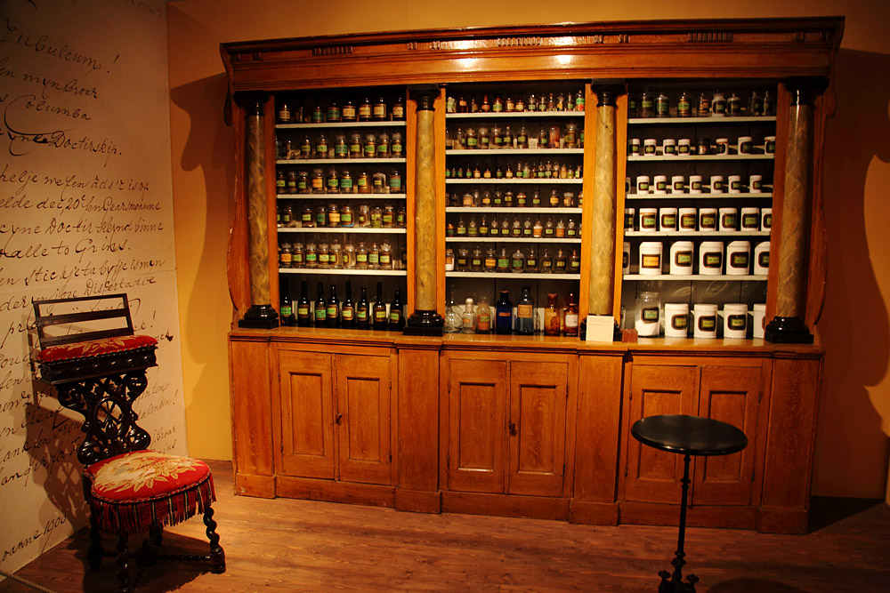 Winkelinterieur Apotheek Lucius Columba Murray-Bakker (1822-1911) opende de deuren in 1850 in Huizen